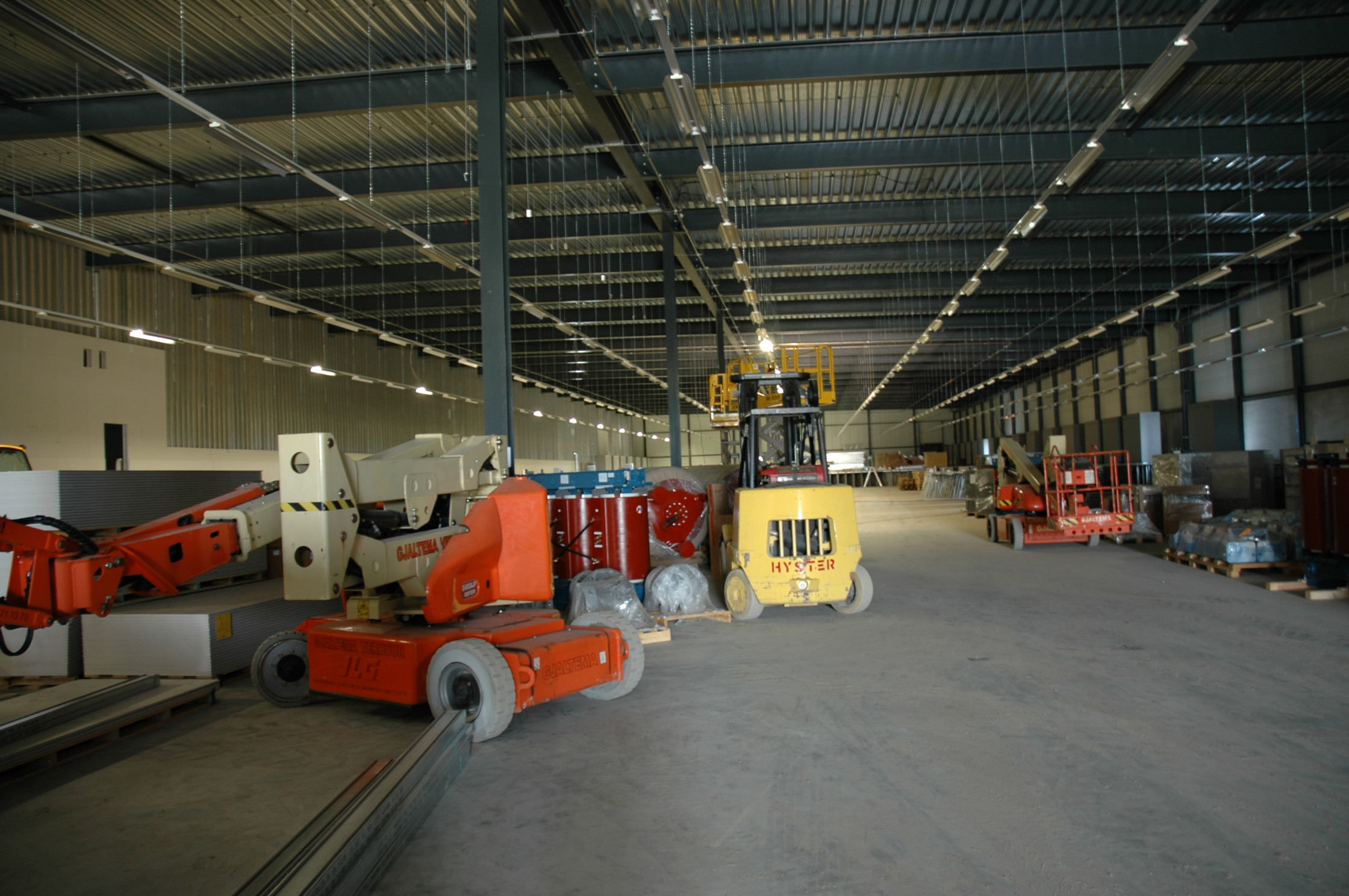 Inside Google datacenter during construction (2007)